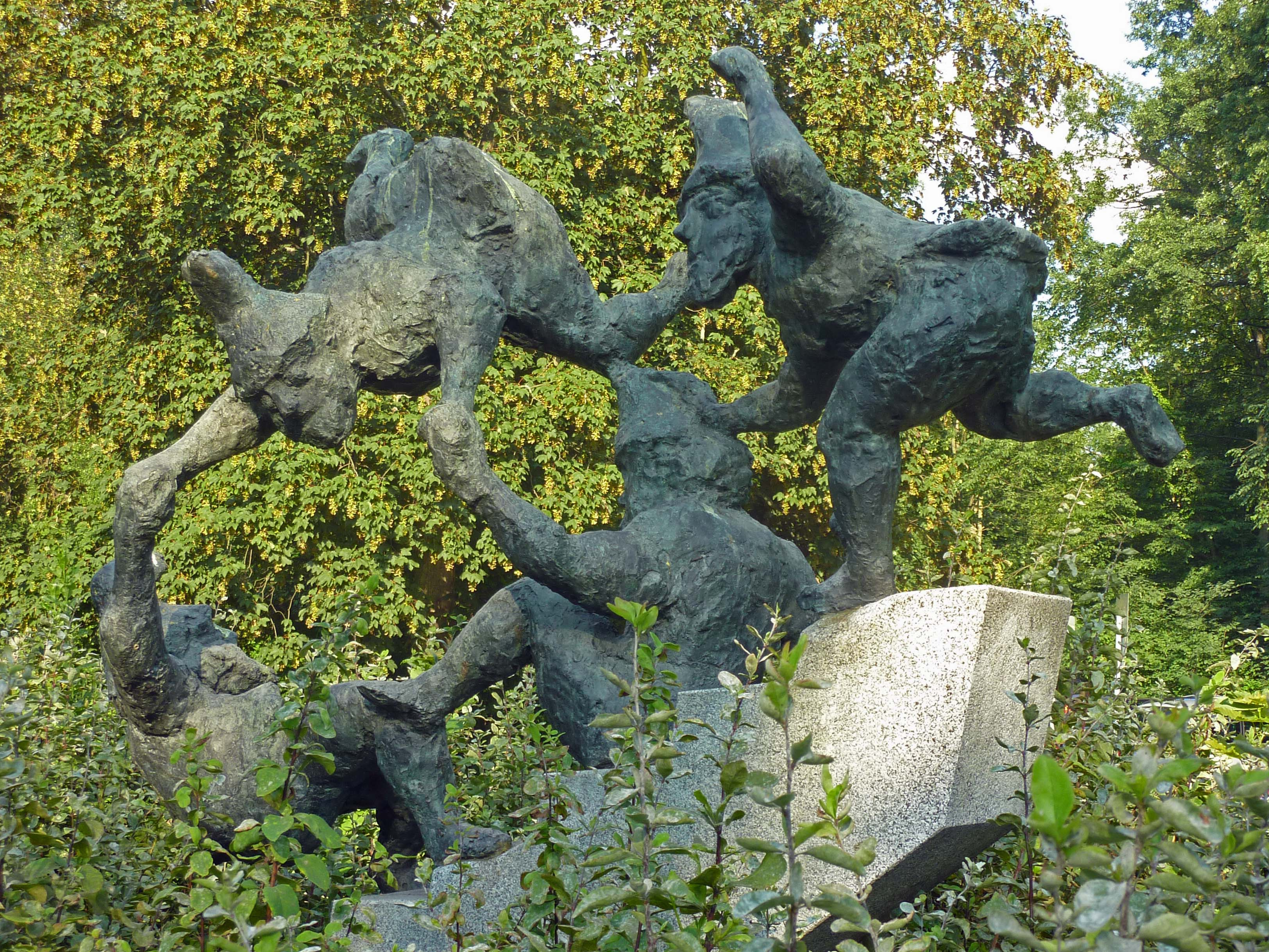 Gruppenplastik 'Vier Heinzelmännchen' (eine Treppe runterpurzelnd) von Werner Richter. Gefertigt aus Bronze und Granit im Jahr 1968. Aufgestellt im Jahr 1981, an der Bulgarischen Straße in Berlin-Alt-Treptow, zwischen der Straße Alt-Treptow und der Abteibrücke. Ragt aus einem schützenden Gebüsch. Seit dem 19. November 2014 vermisst.